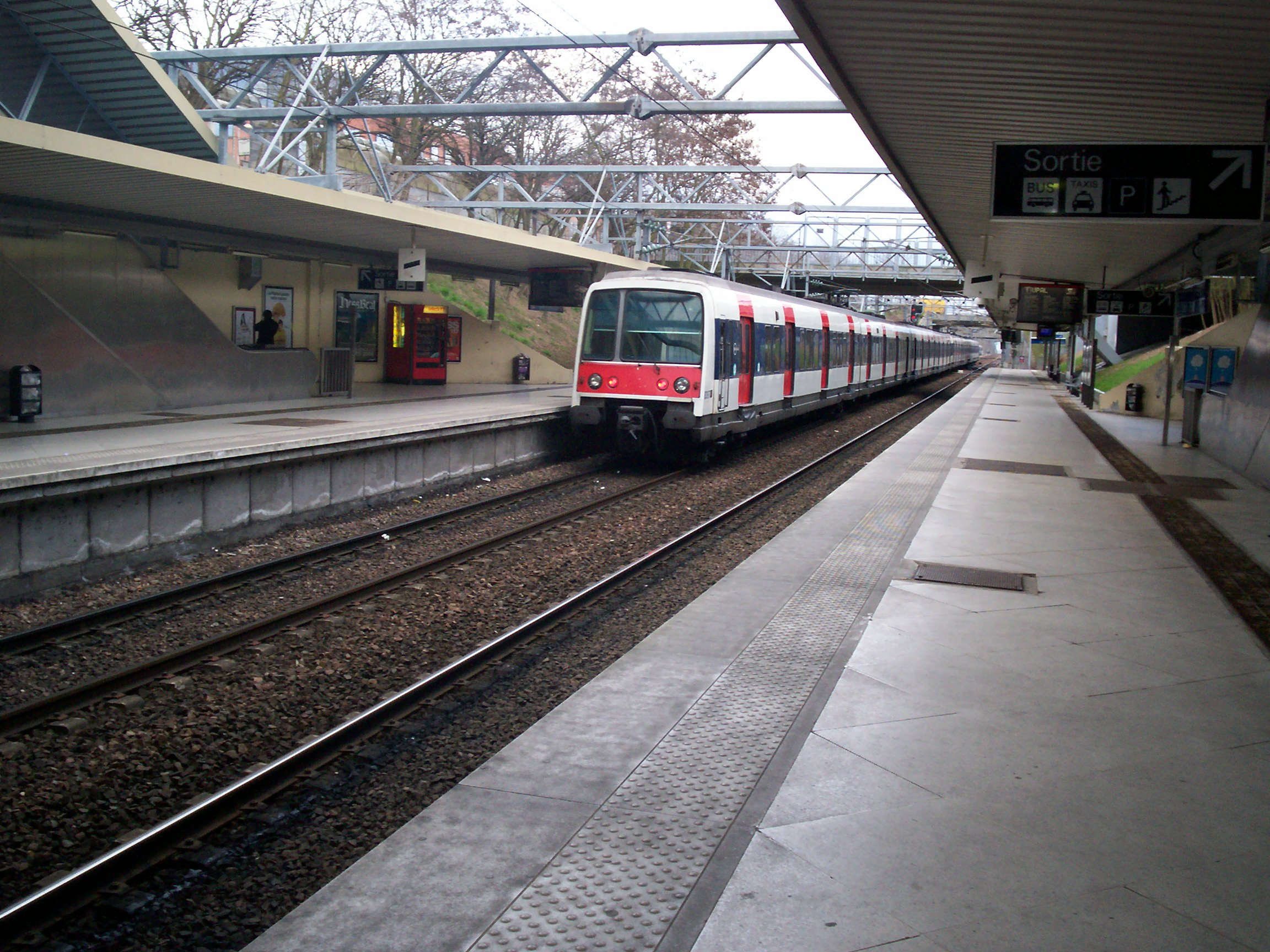 MI84 à Cergy Saint Christophe